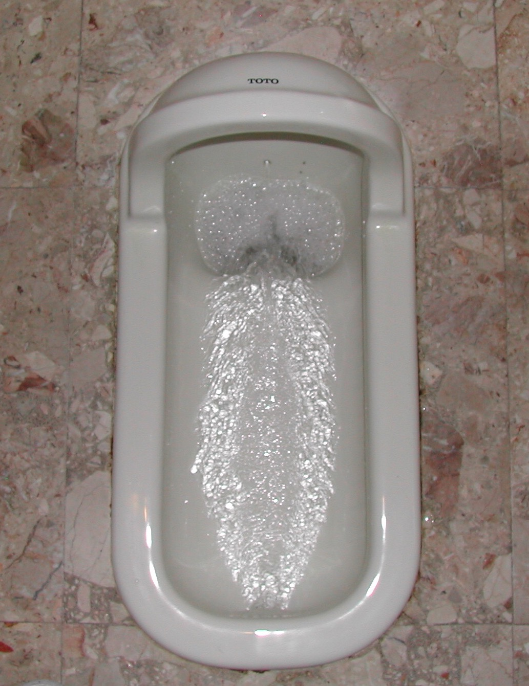 洗浄中ｃ75